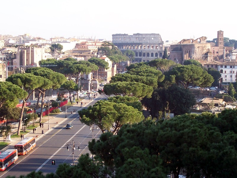 Roma - Via dei Fori Imperiali vista dal Vittoriano